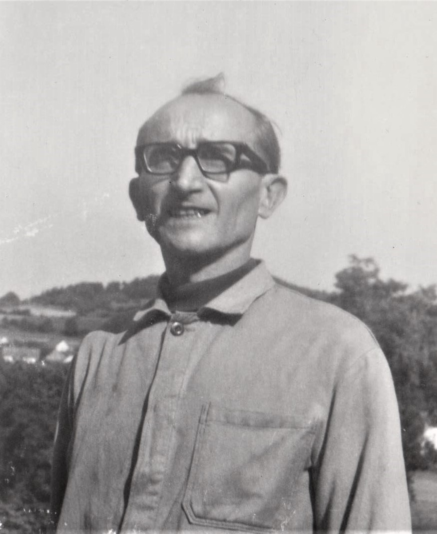 František Daniel Merth